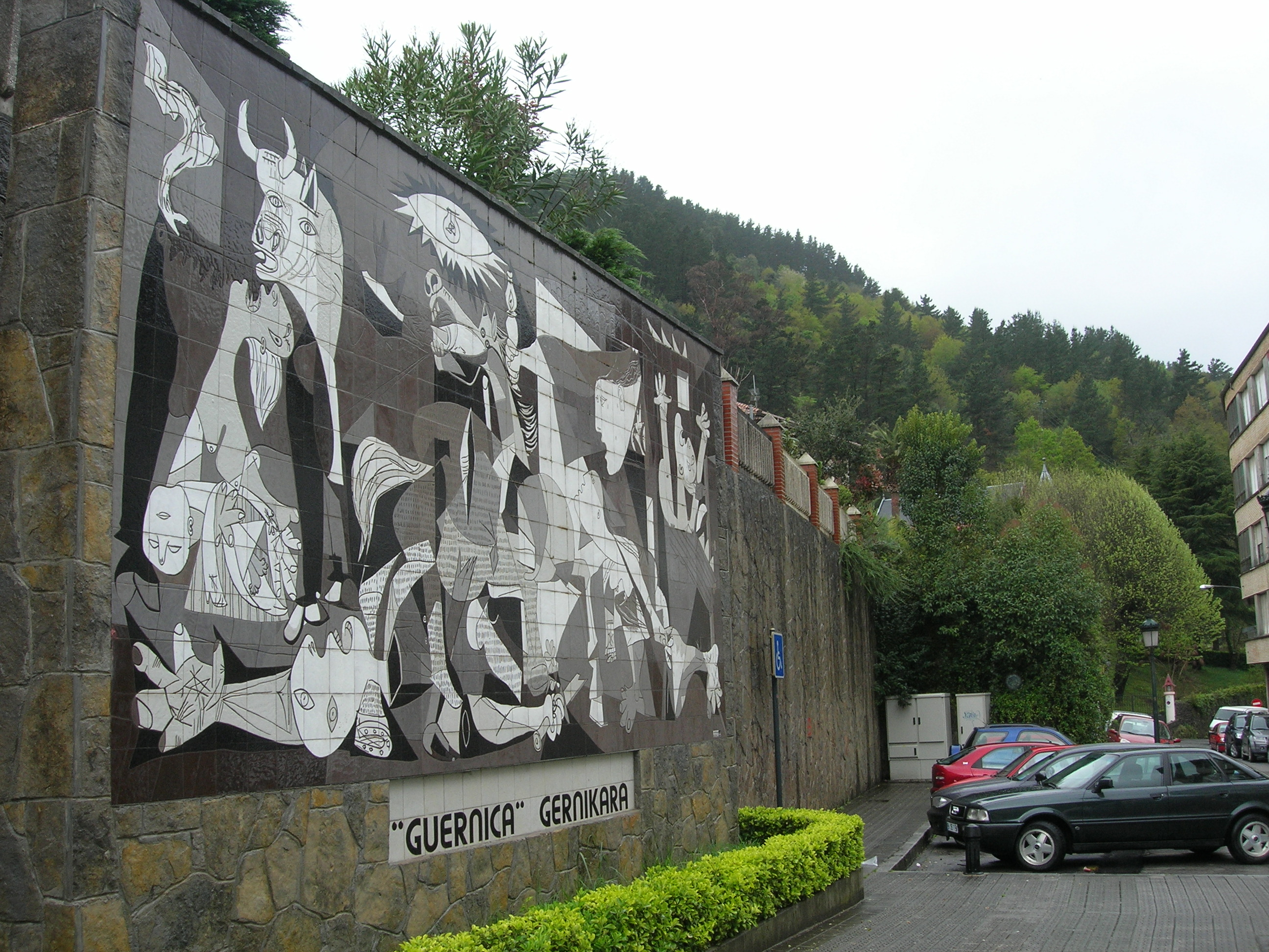 Gernikas "Guernica", murdekoration i staden som gett upphov till Pablo Picassos målning.